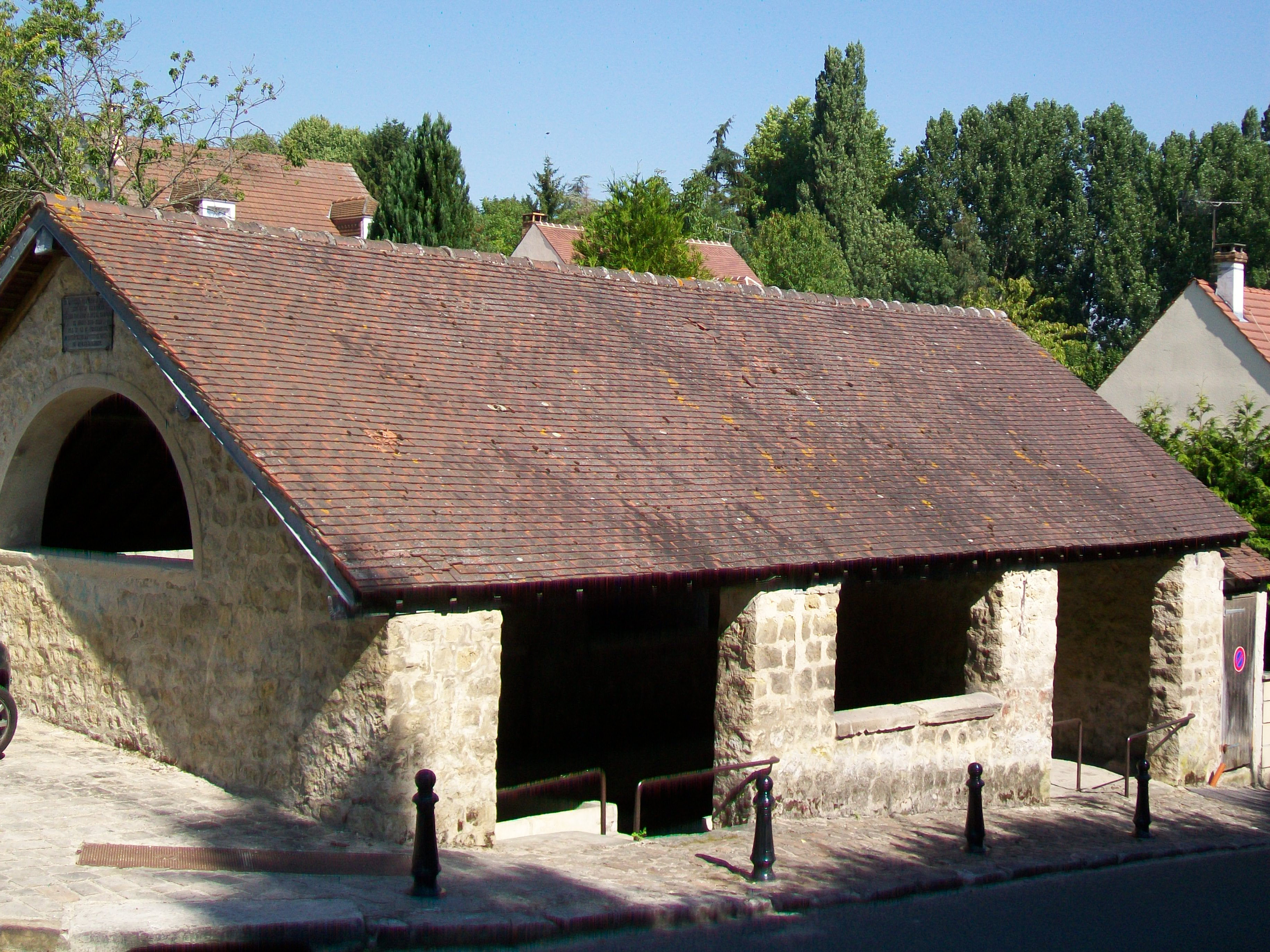 Le lavoir, rue de la République, construit en 1862 grâce à un legs du capitaine Desgranges.